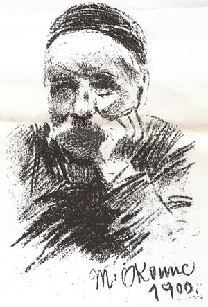 Constant Marie, dit « Le Père Lapurge », né le 27 août 1838 à Sainte-Houvrince (Calvados) et mort le 5 août 1910, est un communard et chansonnier anarchiste, auteur-compositeur de chansons révolutionnaires et libertaires dont « Dame dynamite », « le Père Lapurge », « L’Affranchie » et « la Muse rouge ».